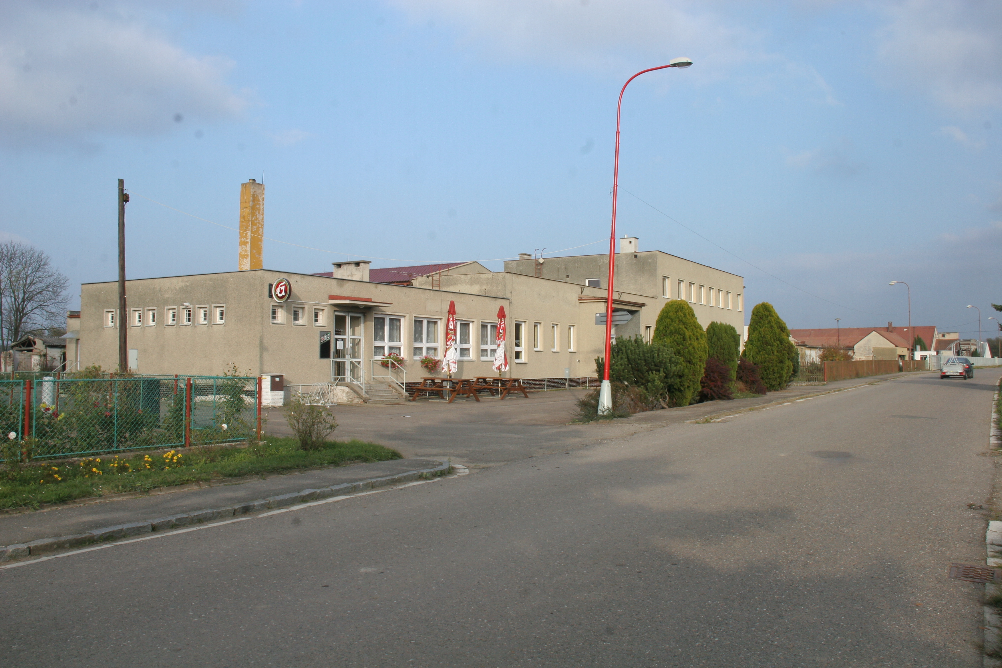 trusnov hospoda